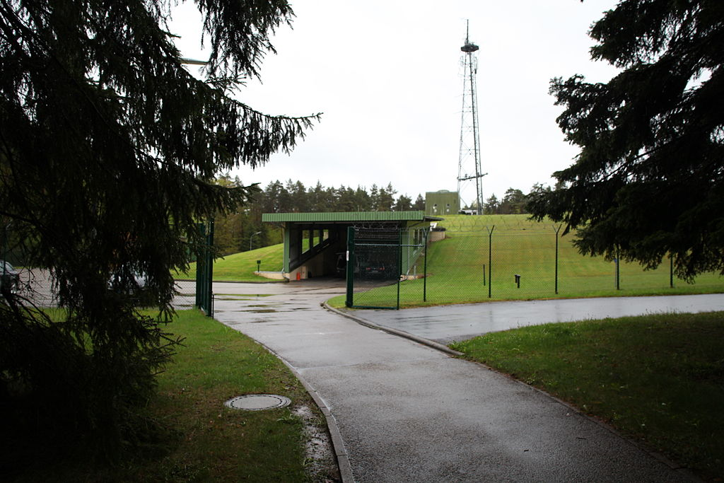 Atomschutzbunker CITA in Oberreichenbach